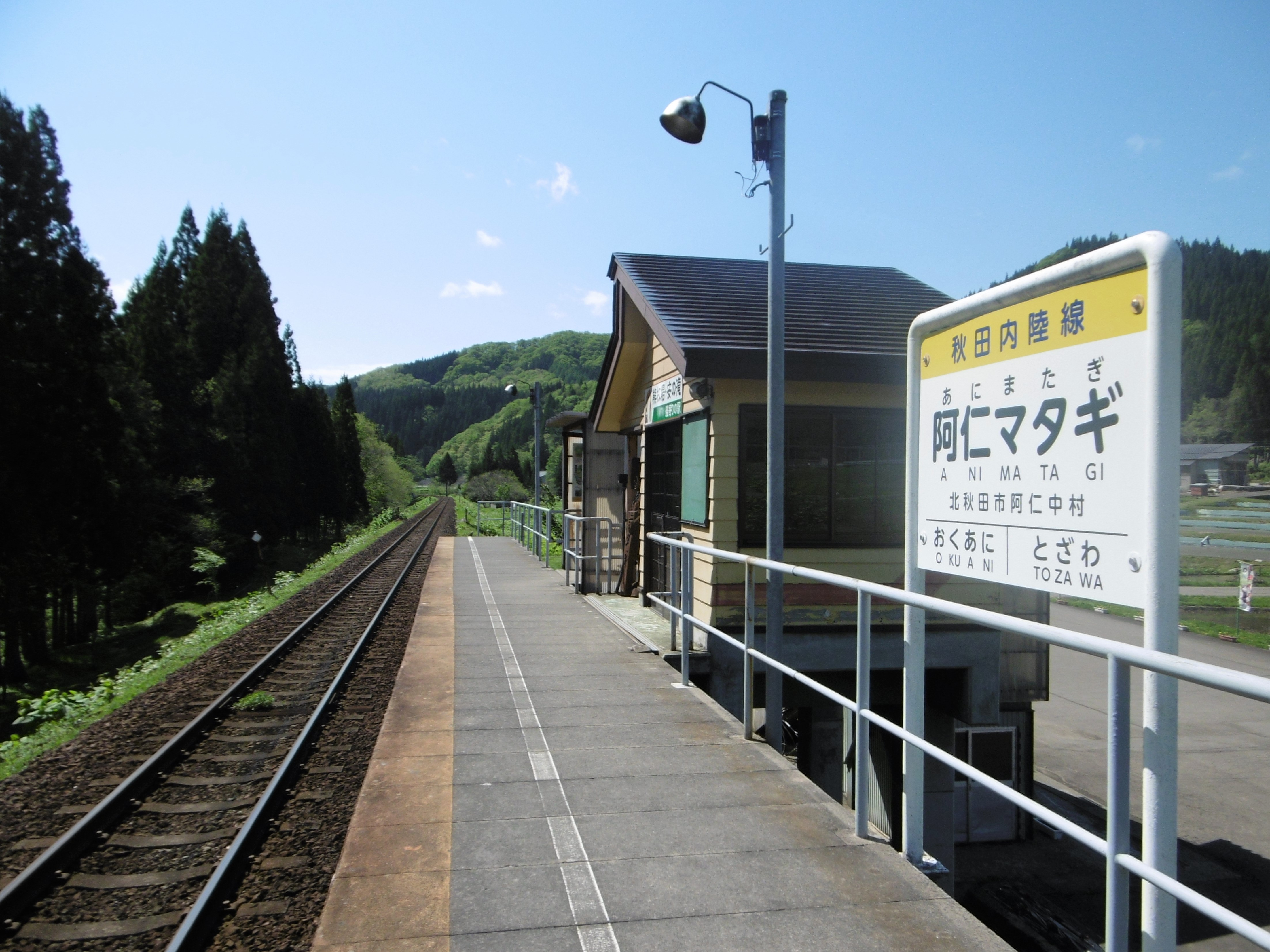 秋田内陸線 阿仁マタギ駅 プラットホーム